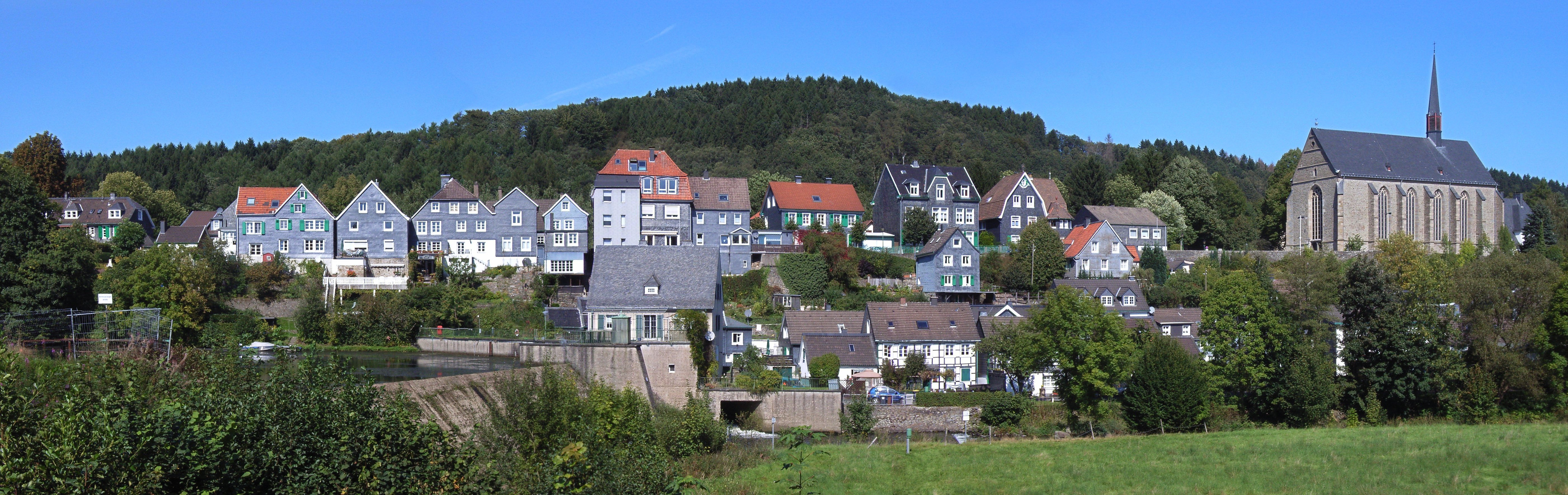 Panorama des historischen Ortskerns des Wuppertaler Stadtteils Beyenburg